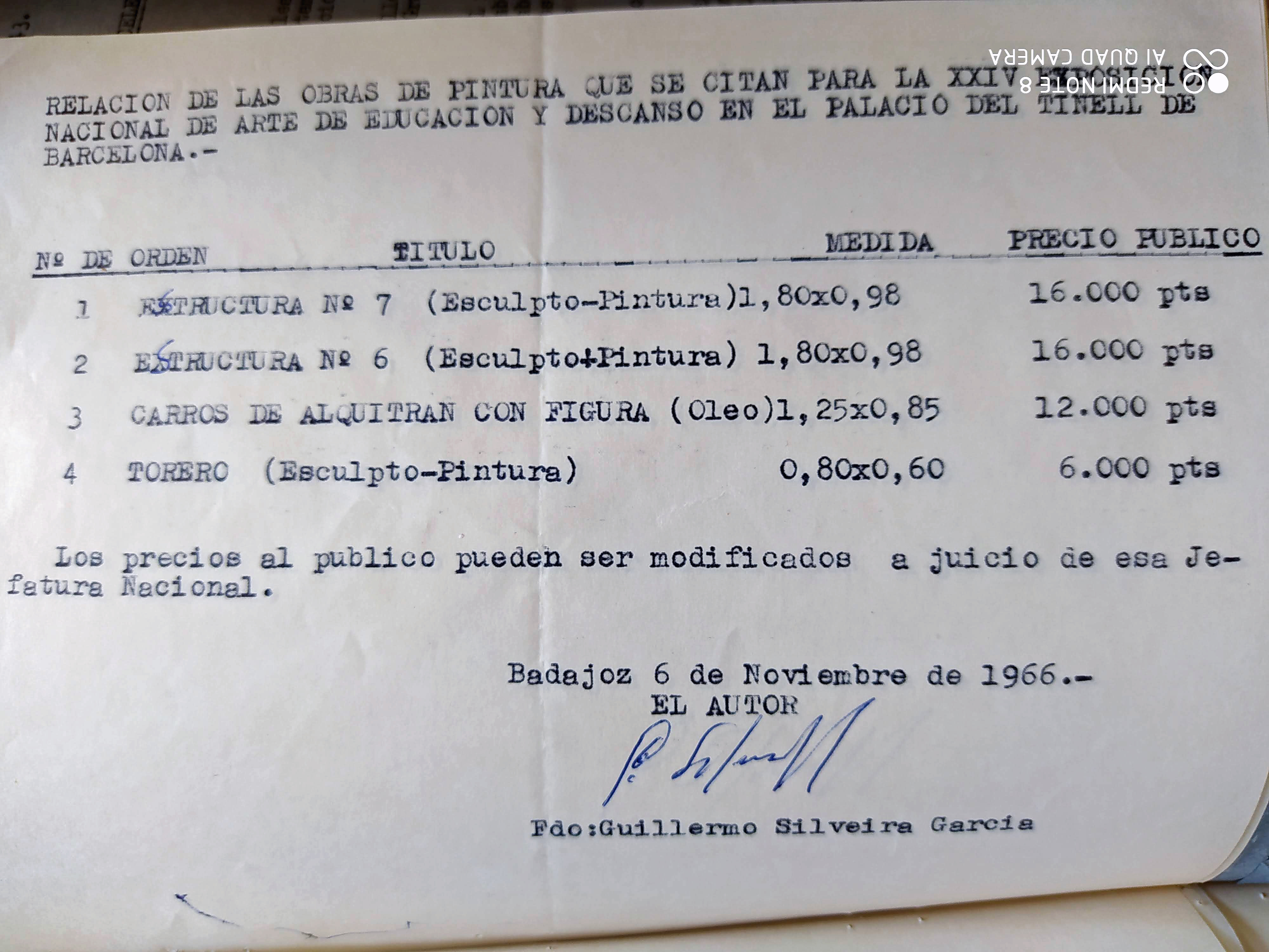 XXIV Exposición Nacional de Arte de la Obra Sindical de Educación y Descanso. Salón del Tinell. Barcelona, noviembre de 1966 (doc. 08).